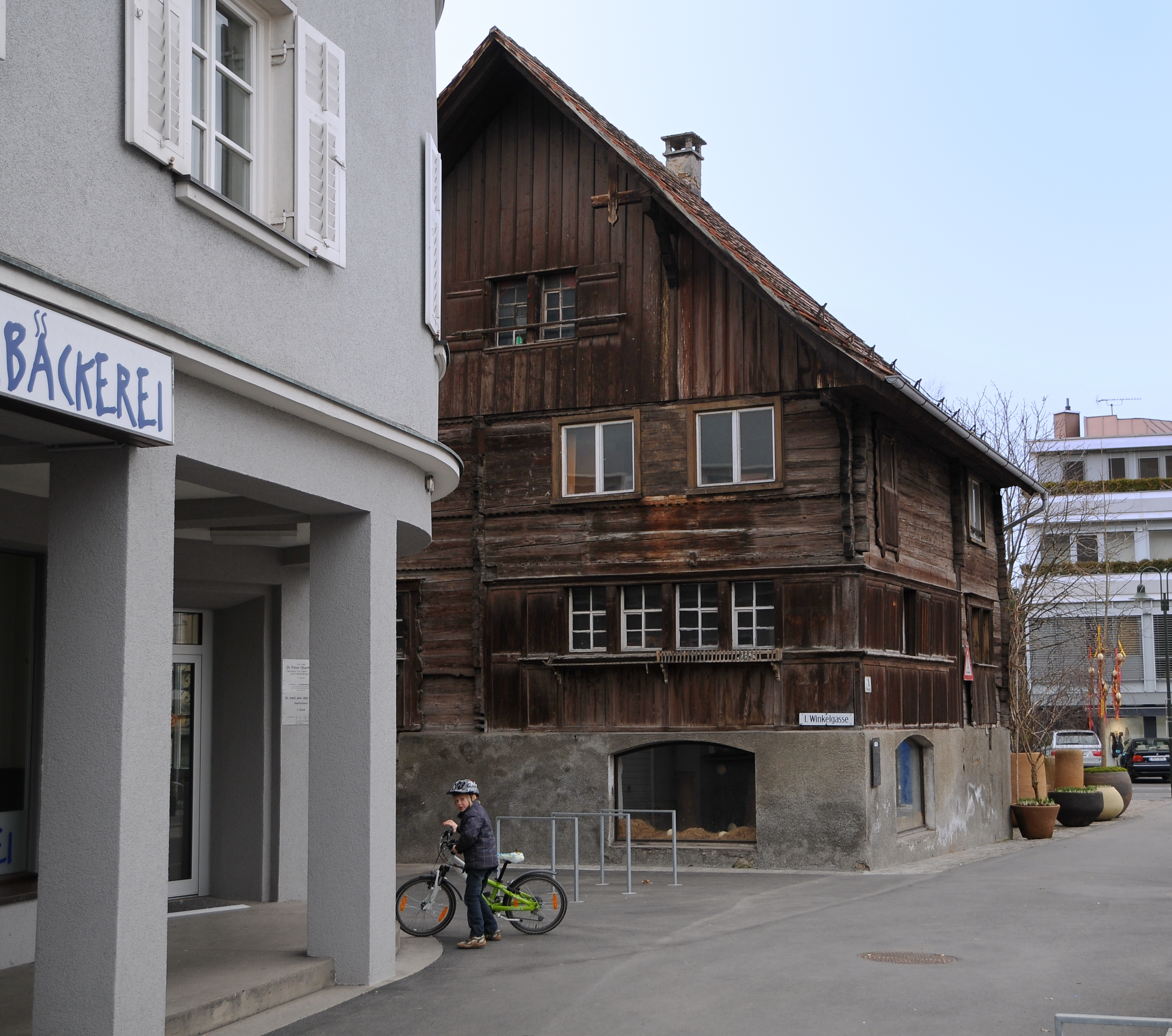 Ecke Klostergasse 1 und Winkelgasse 1 in Markt Dornbirn. aus dem DEHIO Vorarlberg 1983: Rheintalhaus, 2geschossigin Kopfstrickbauweise auf Mauerstock gezimmert, teilweise getäferte Fassade.